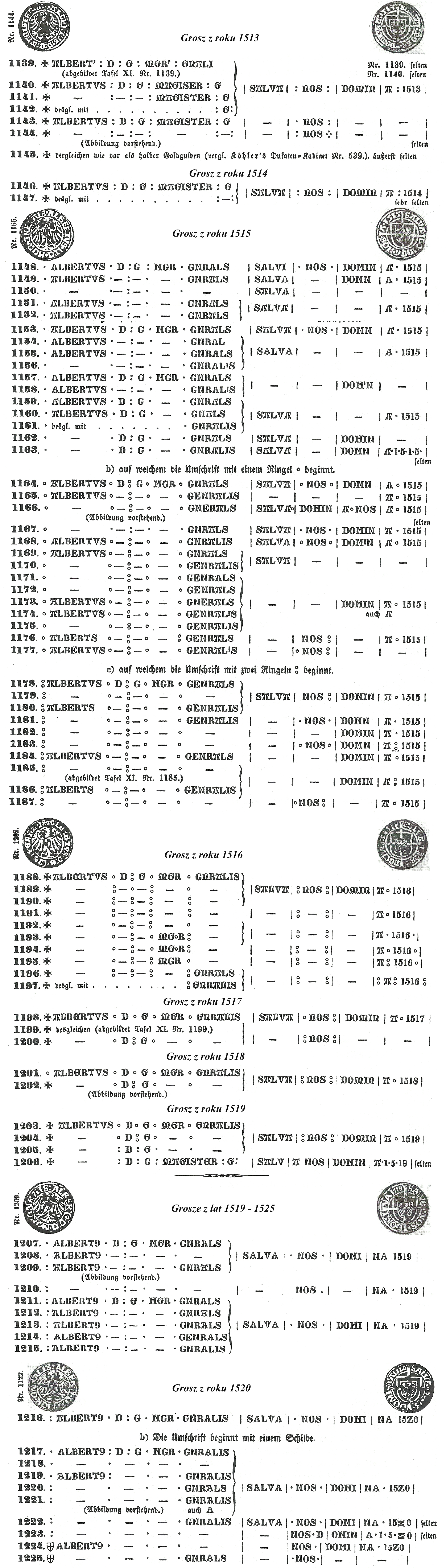 Monety_krzyżackie__1511_-_1525_a.